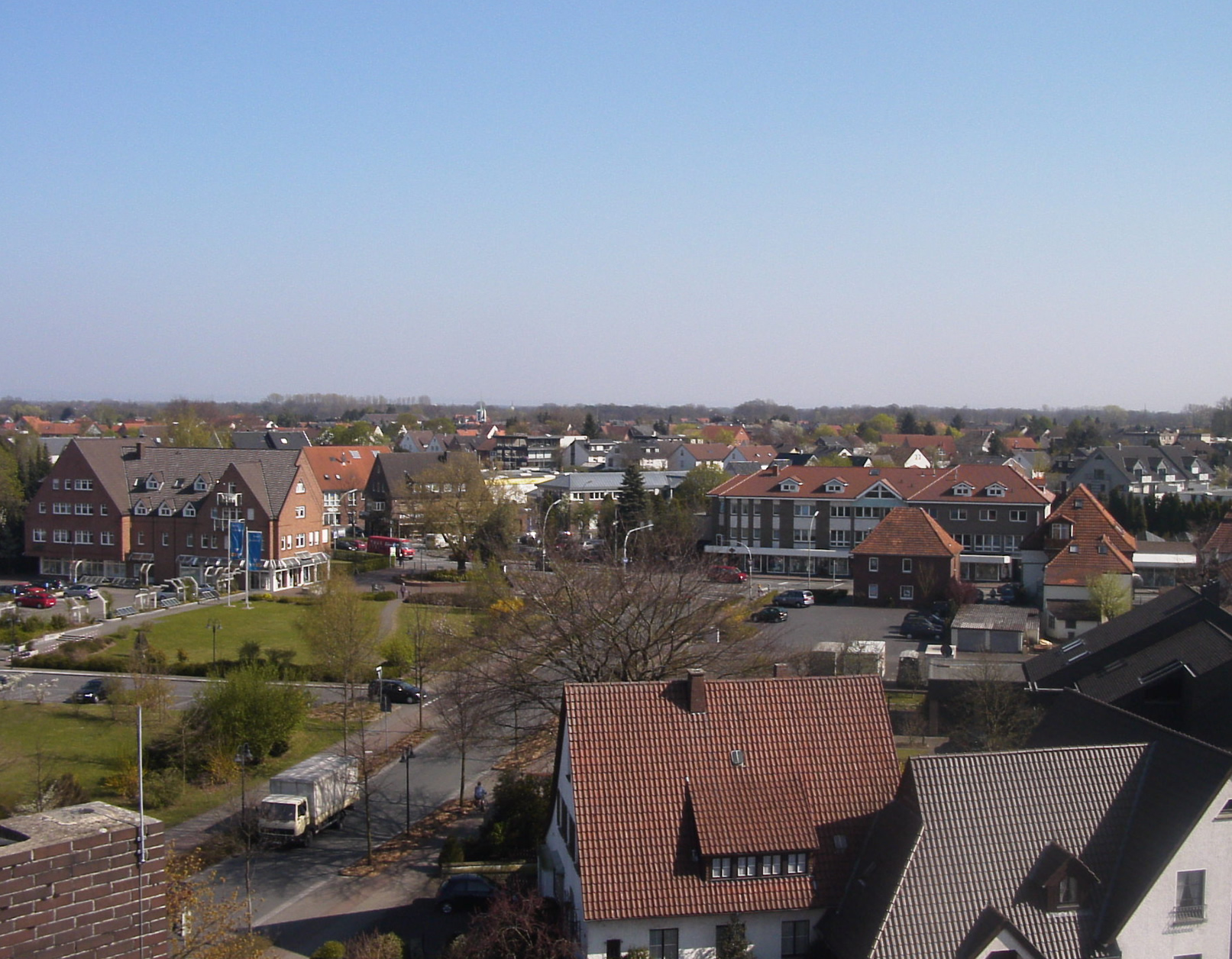 Blick über Verl in Richtung Kaunitz. Im Hintergrund die Kirchen von Verl (evgl.) und Kaunitz (kath.). Aufgenommen wurde das Foto vom Dach des Altenzentrums St. Anna Verl.